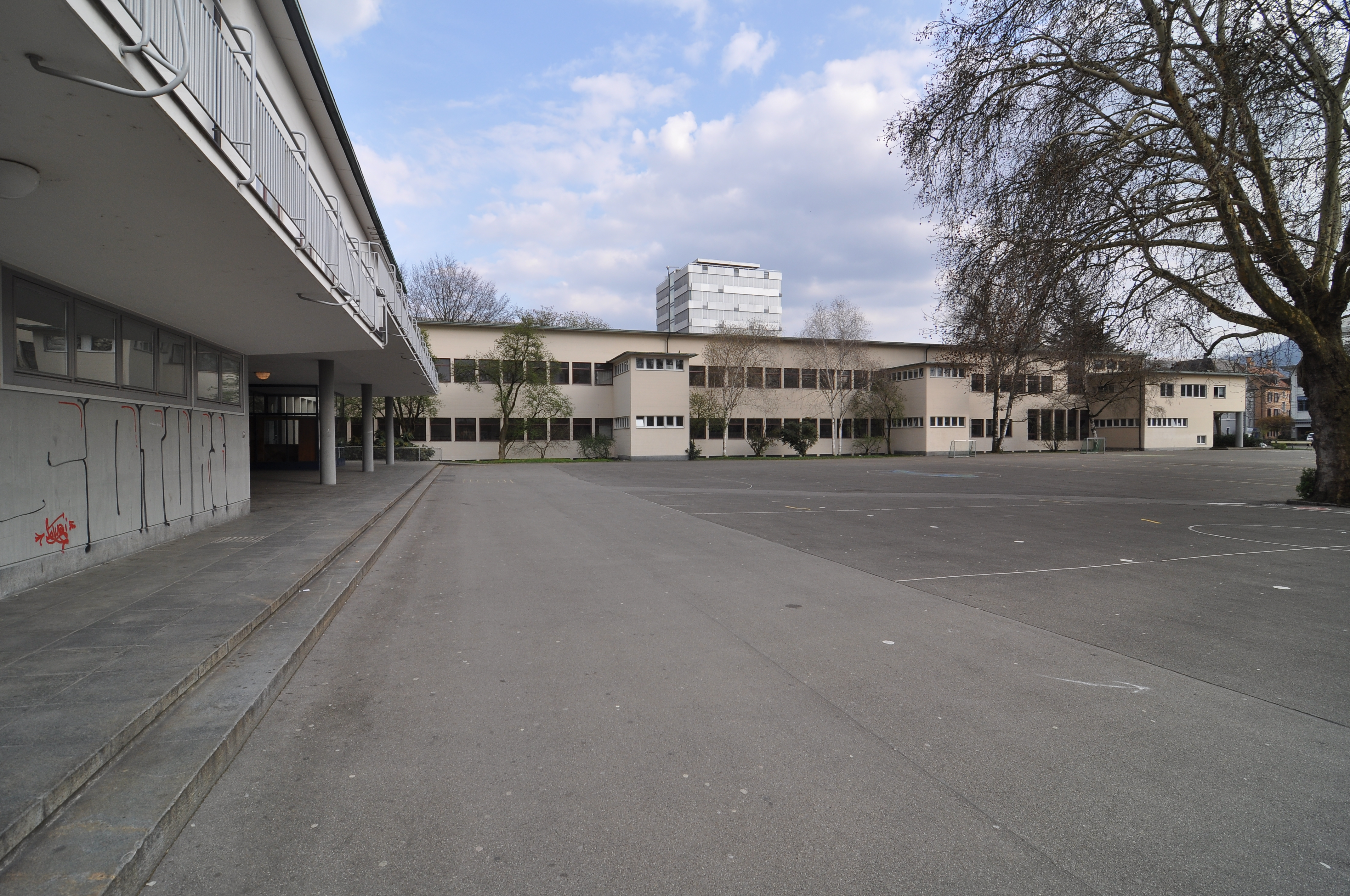 Schulhaus Kappeli, Zürich, 1937, Architekt: Gebrüder Oeschger